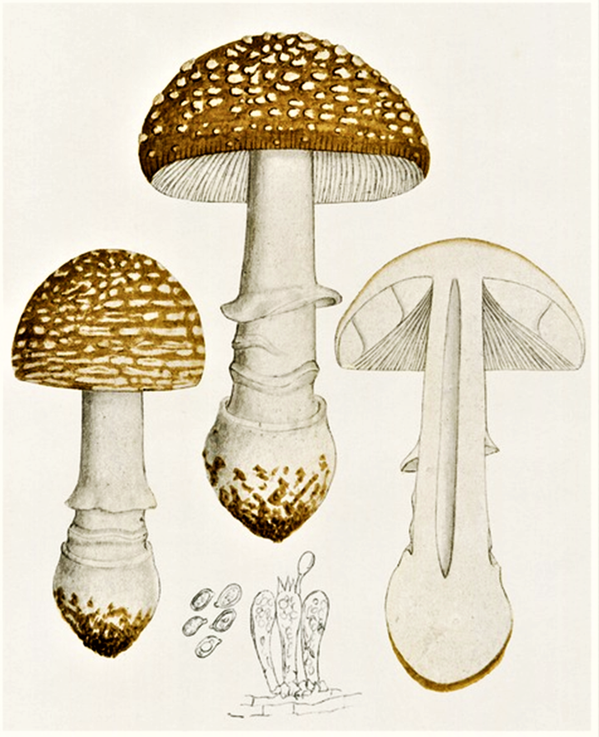 Giacomo Bresadola: Amanita pantherina (DC., 1815), Krombh. (1846)